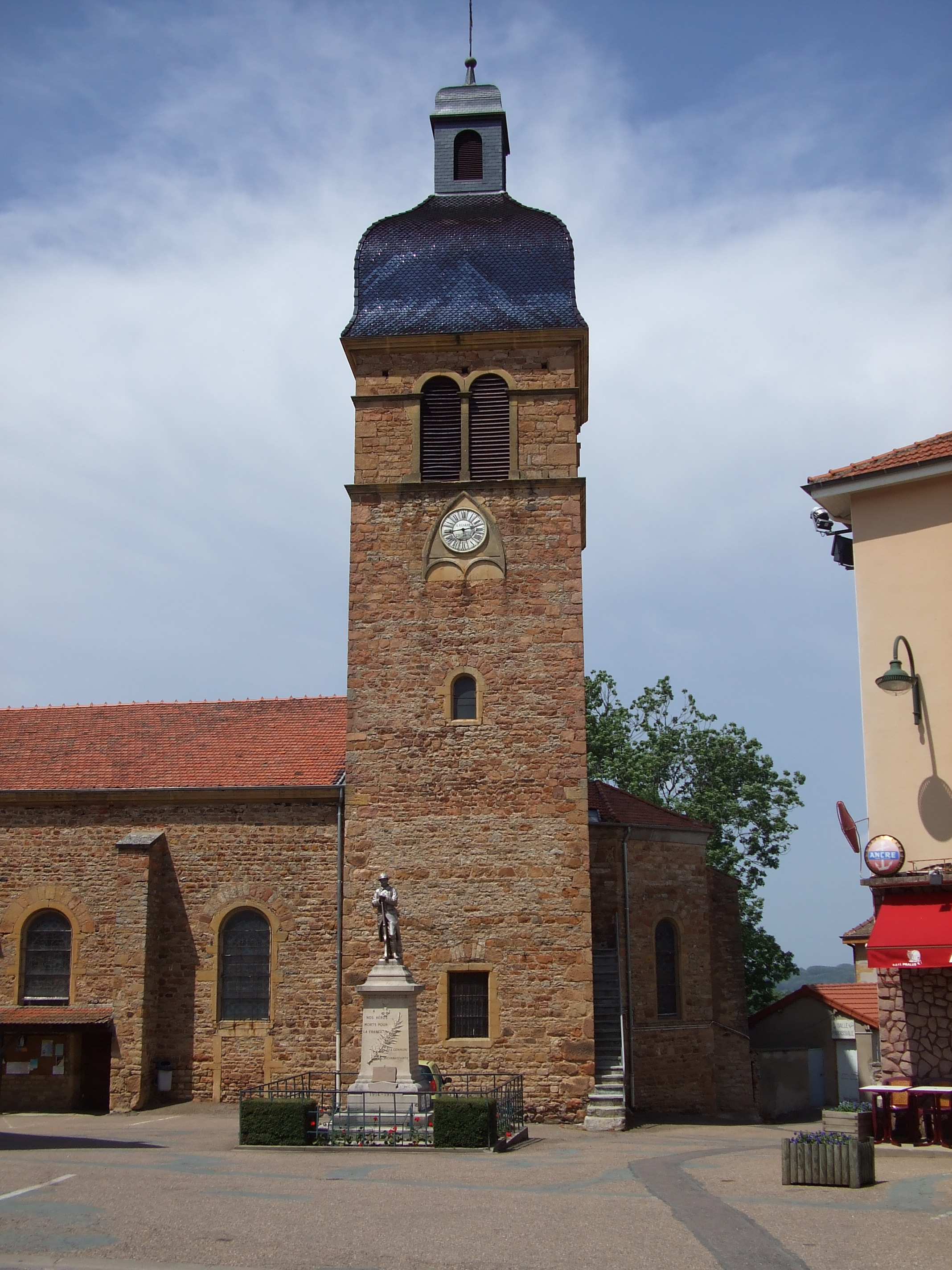 Clocher de l'église de Coutouvre (France, Loire)